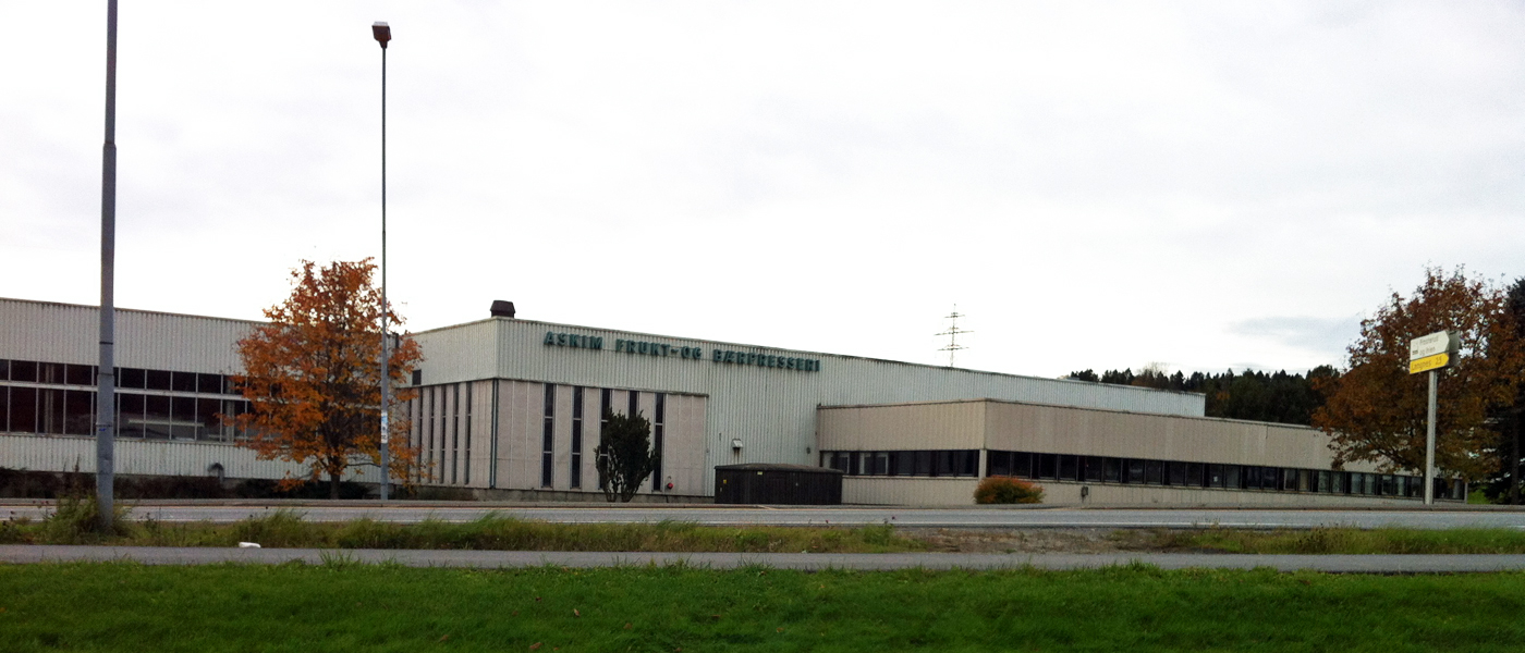 Askim Frukt- og Bærpresseri AS er en norsk bedrift etablert i 1936, lokalisert i Osloveien 93 i Askim i Østfold. Bedriften driver med pressing av frukt, bær og rapsfrø, og produserer saft, most, gelé, syltetøy og rapsolje.